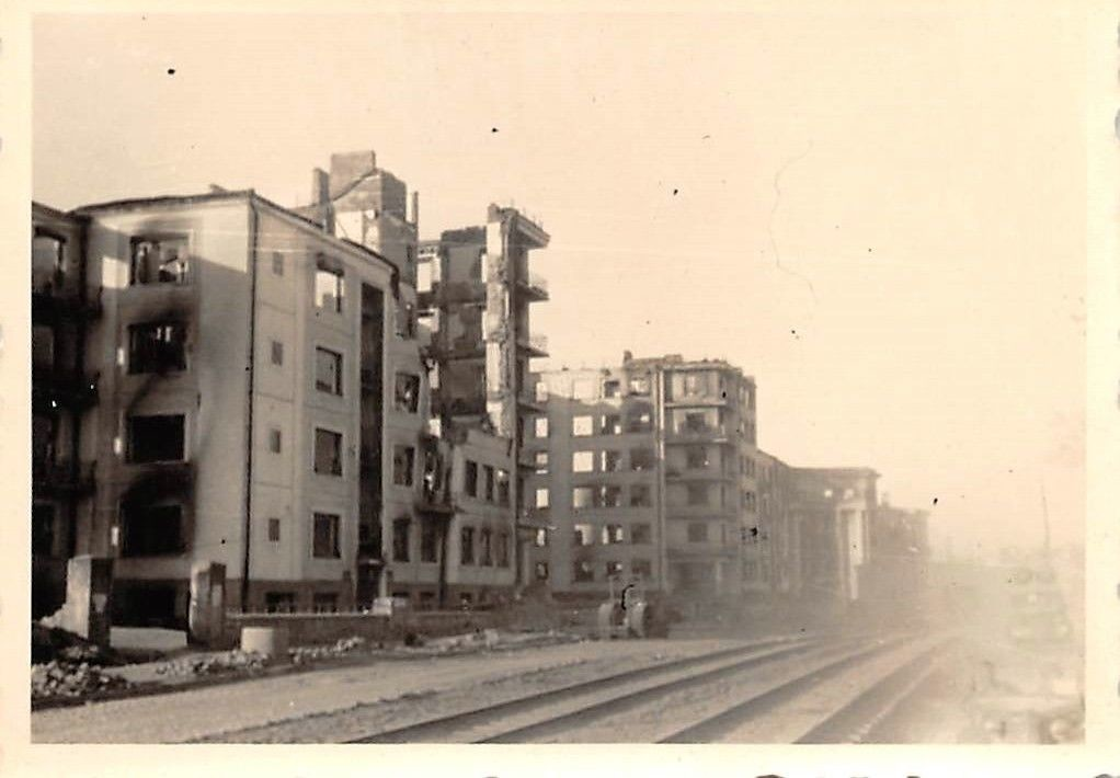 Беларуская (тарашкевіца): Менск (Miensk), Залатая Горка (Załataja Horka), рог вуліц Захараўскай (vulica Zacharaŭskaja) і Даўгабродзкай (vulica Daŭhabrodzkaja)